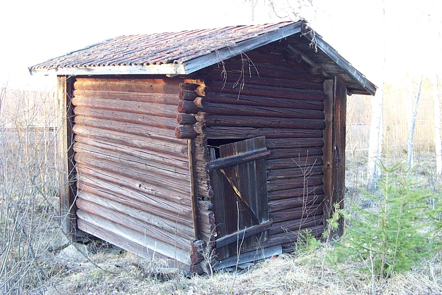 Lada av rundtimmer väster om Björbo